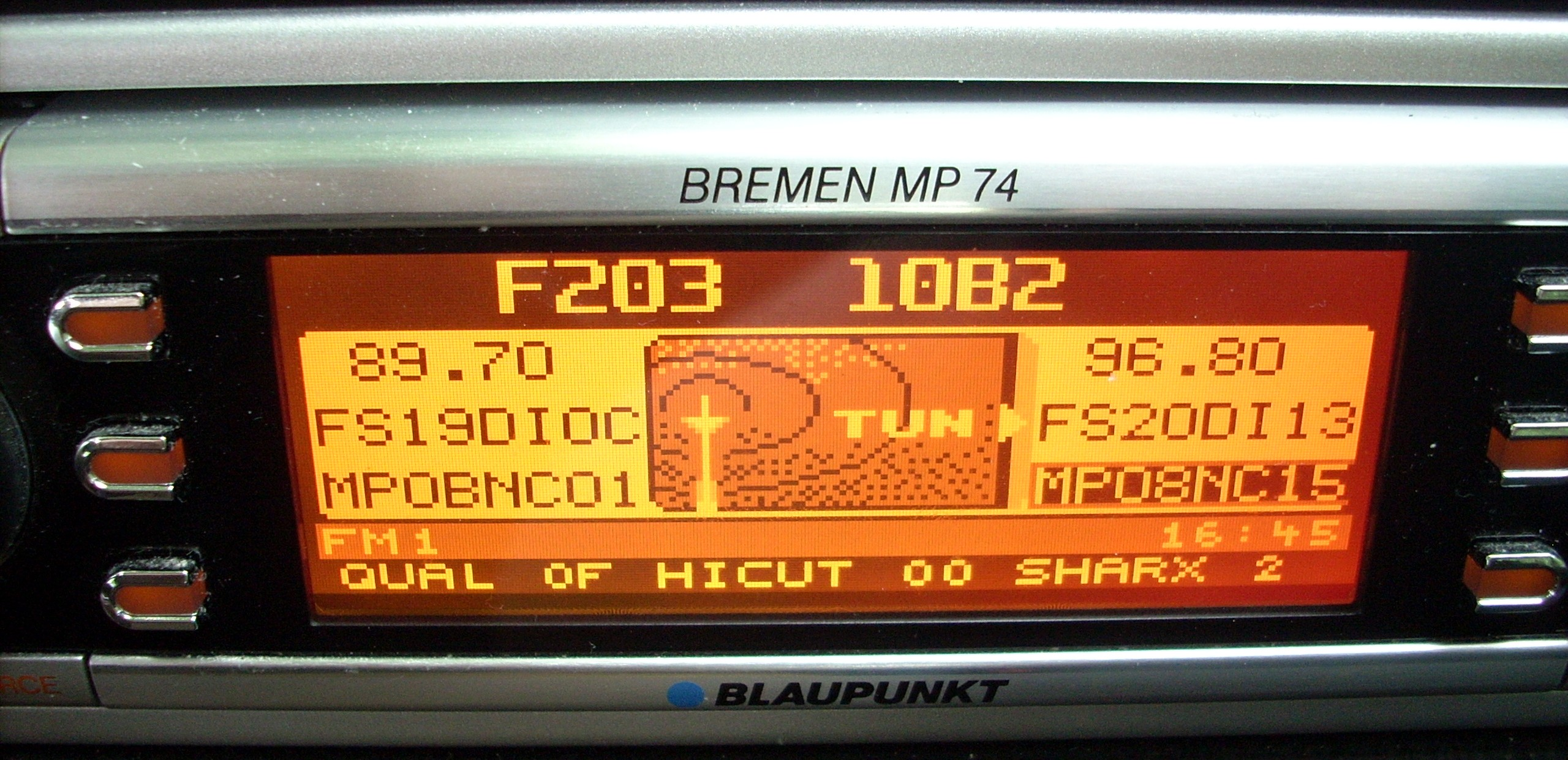 Servicemenü des Blaupunkt Bremen MP74 (Aktivierung: Gerät mit gedrückter "Programm1"- und "Menü"-Taste einschalten). Aktuelle Frequenz: 89,70 MHz (France Musique, Sender Luttange (Metz), PI-Code F203); aktuelle Suchlauffrequenz: 96,80 MHz (bigFM Saarland, Sender Friedrichsthal/Hoferkopf, PI-Code 10B2)